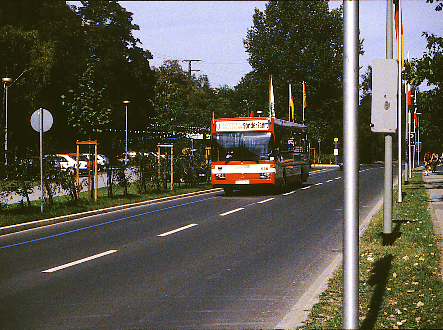 Universiade Duisburg 89